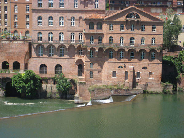 Le Centre d'art contemporain de la ville d'Albi se situe au bord du Tarn.